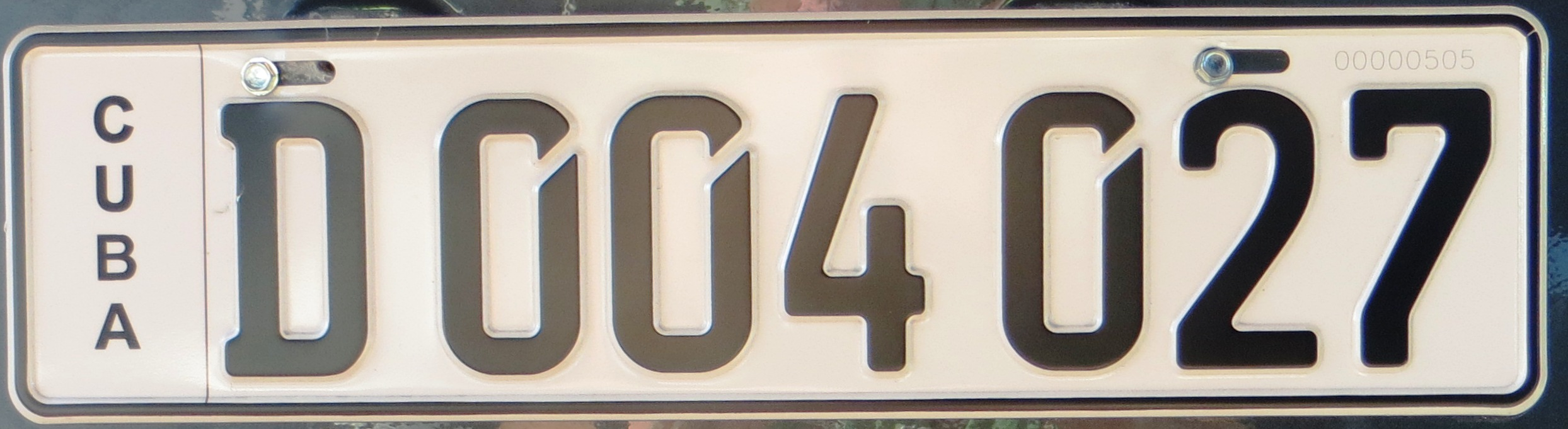 Kentekenplaat uit Cuba